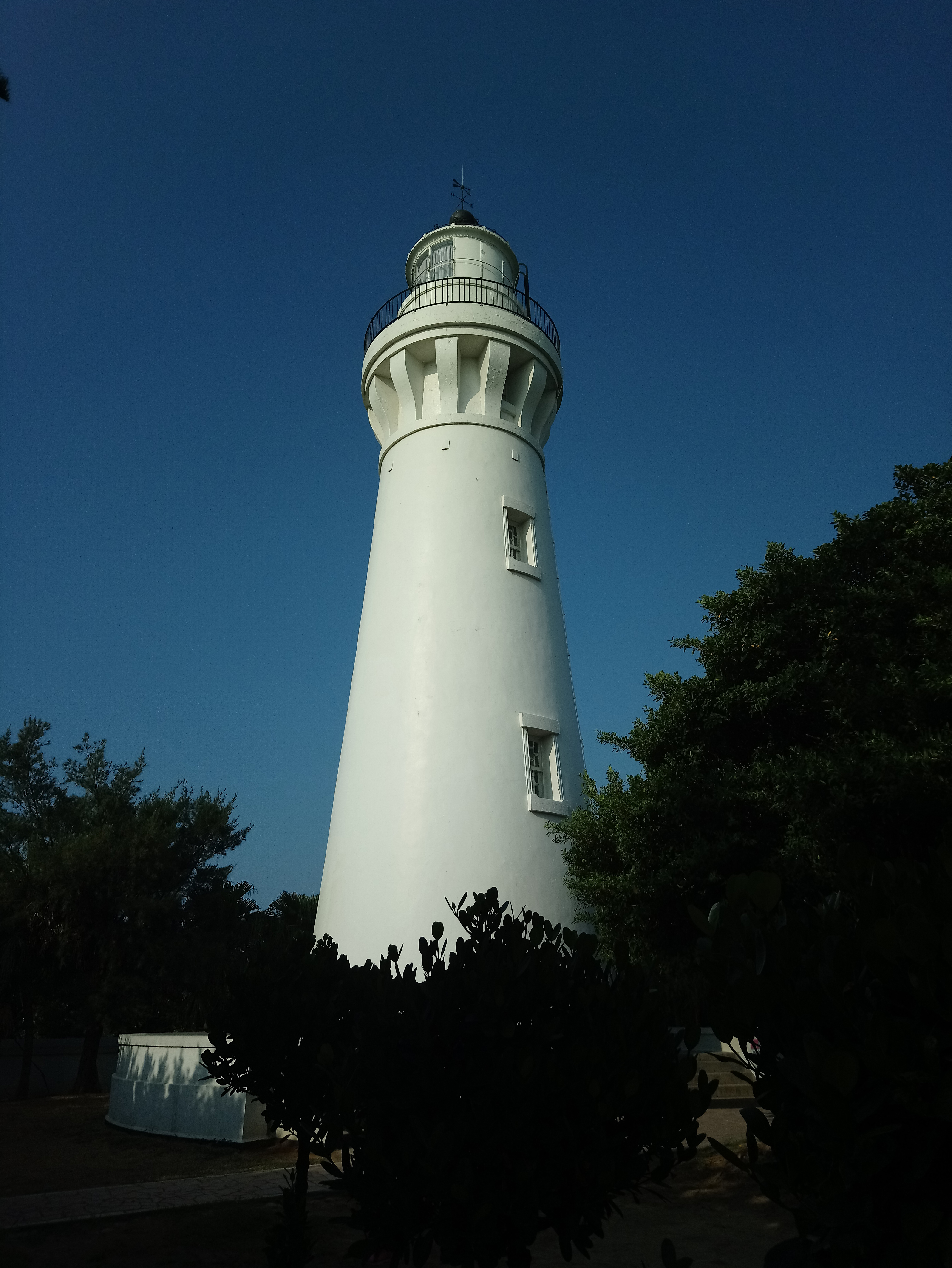 白沙岬燈塔塔身,桃園市觀音區觀音地區觀音里